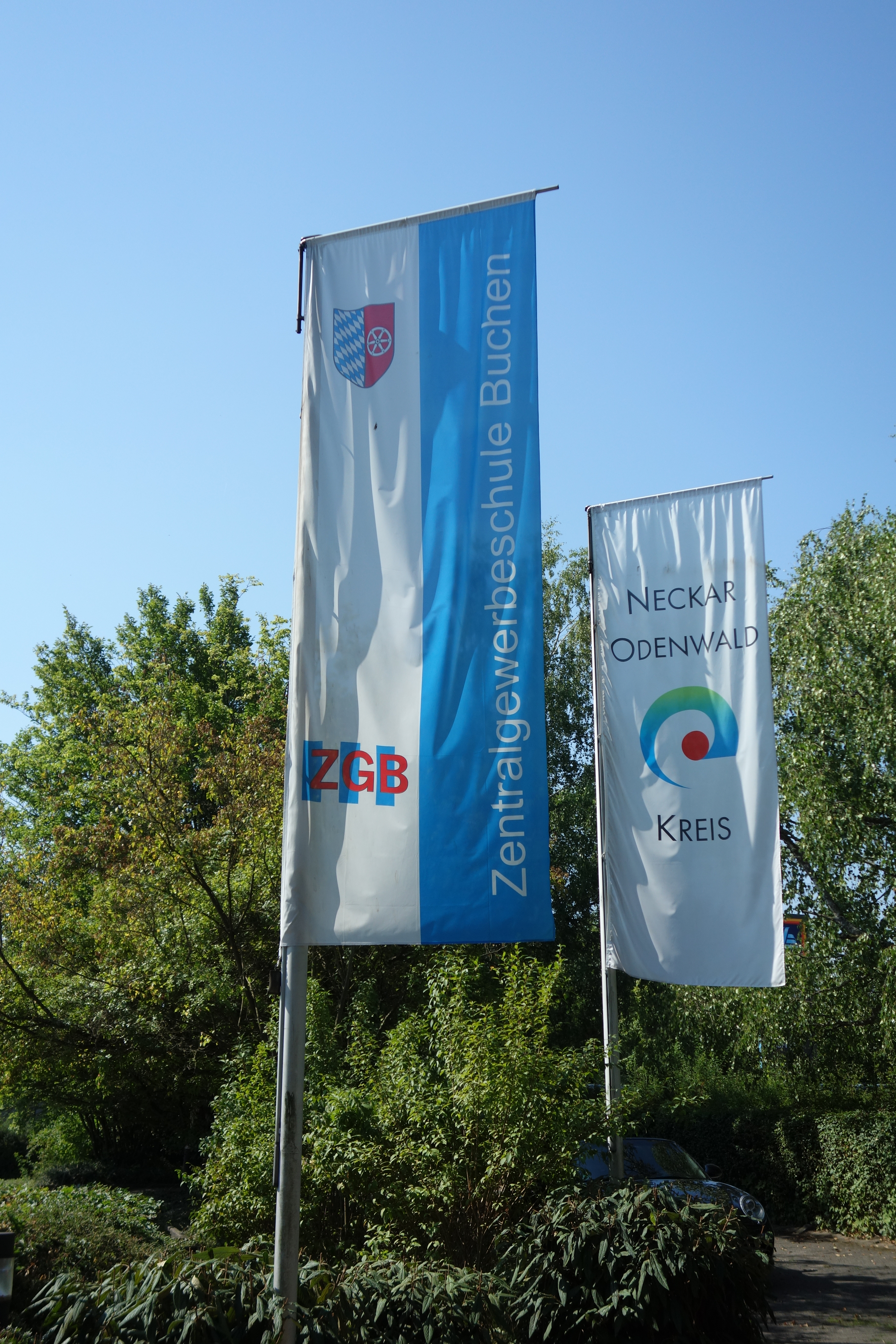 Fahnen von Schule und Träger der Schule auf dem oberen Schulhof.